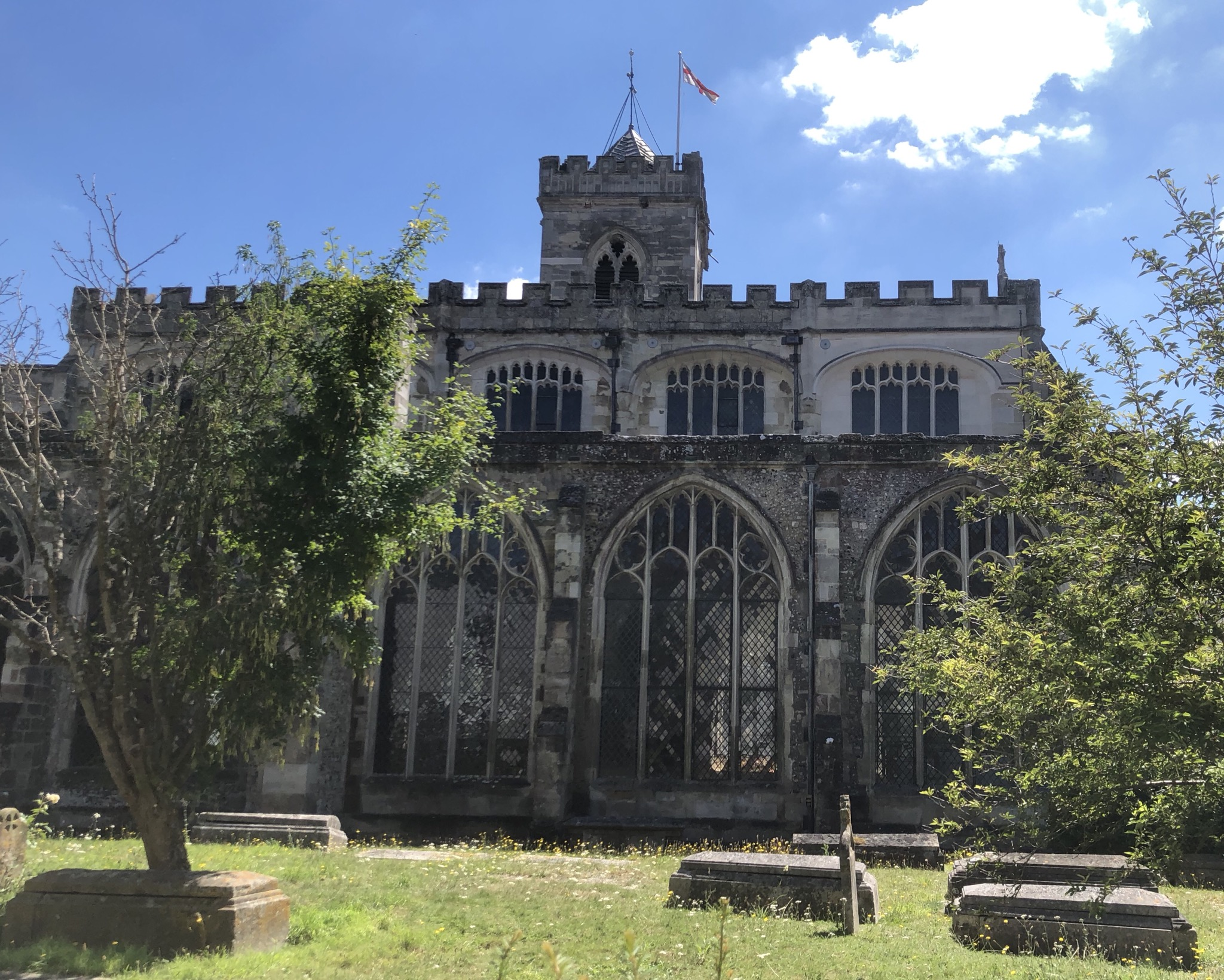 St. Thomas Kirche in Salisbury